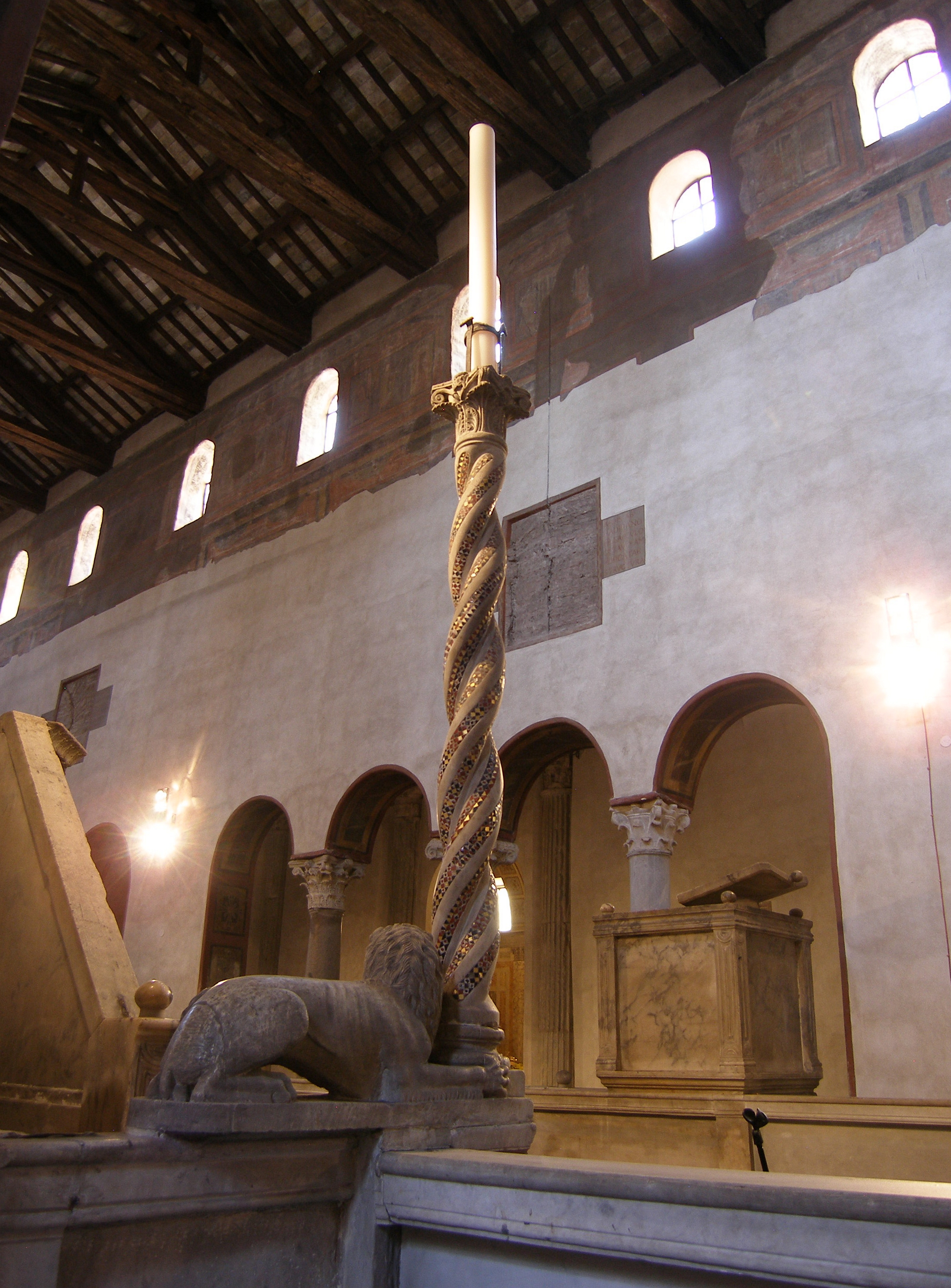 Rom, Santa Maria in Cosmedin, Osterleuchter mit Kosmatenarbeit